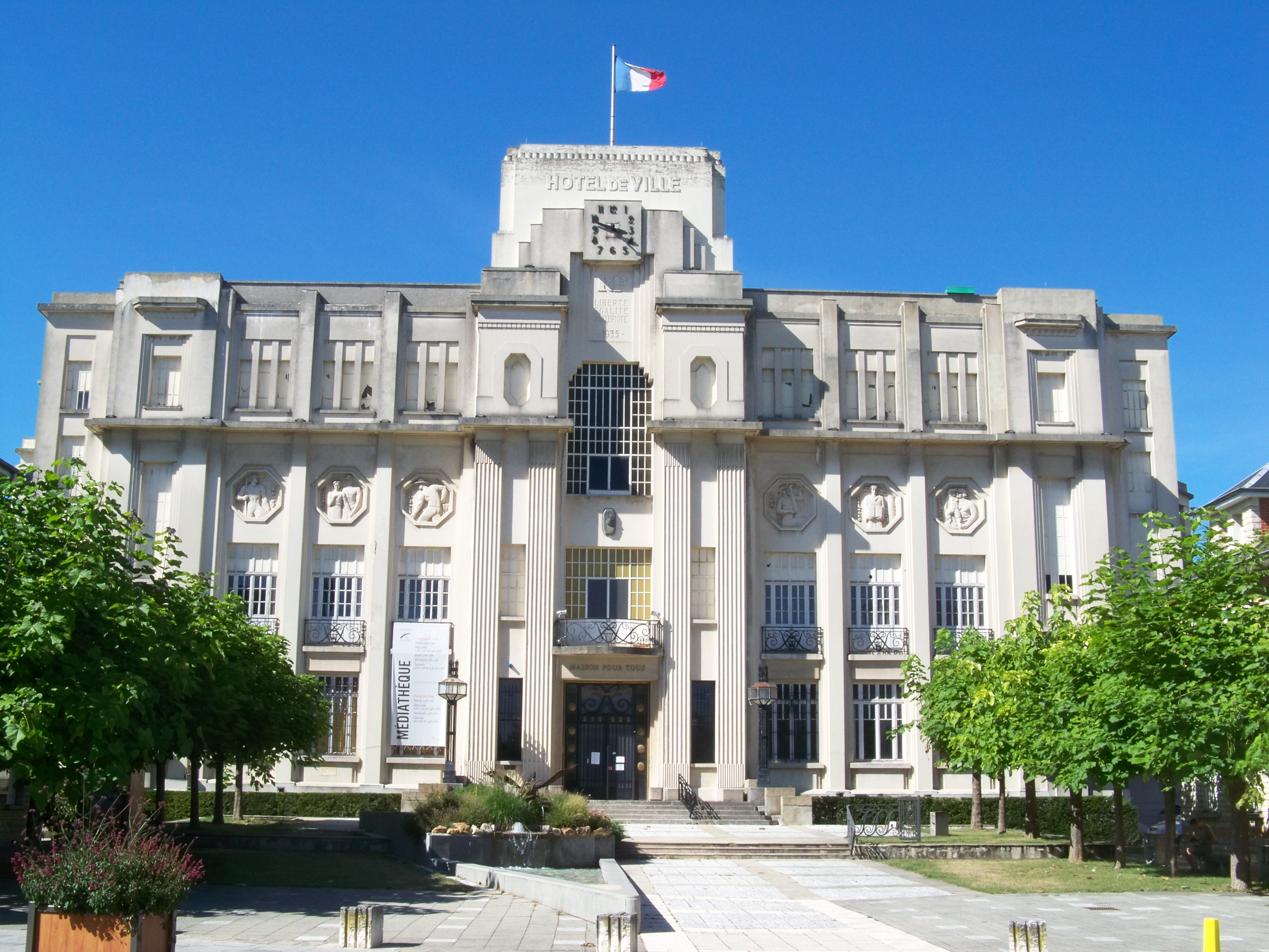 L'hôtel de ville de Sainte-Savine, construit entre 1932 et 1935 par J. Hugot et R. Roger, monument inscrit depuis 2007. .